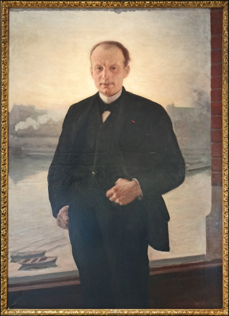 En 1882, Louis Lefèvre-Utile prend la direction de l'entreprise familiale et transforme la petite pâtisserie en une usine importante qui fera la renommée de la ville de Nantes dans le domaine des biscuits. C'est lui qui a créé la marque LU, acronyme de Lefèvre-Utile. (extrait du cartel) Site du Château-musée